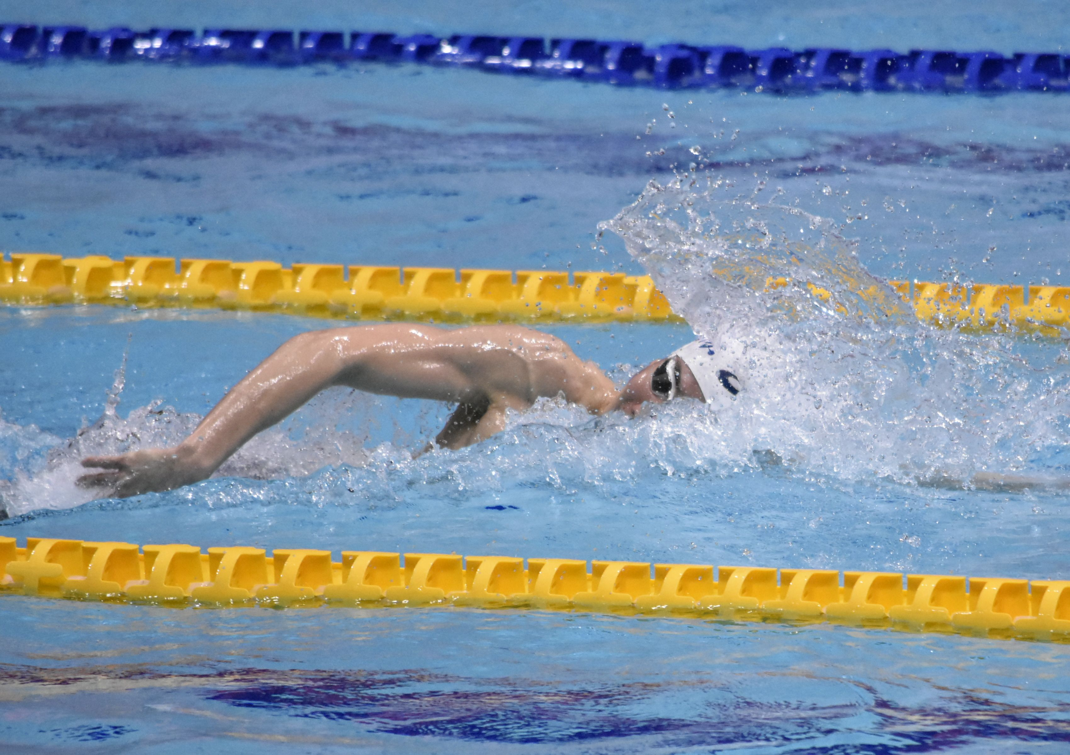 江原 騎士